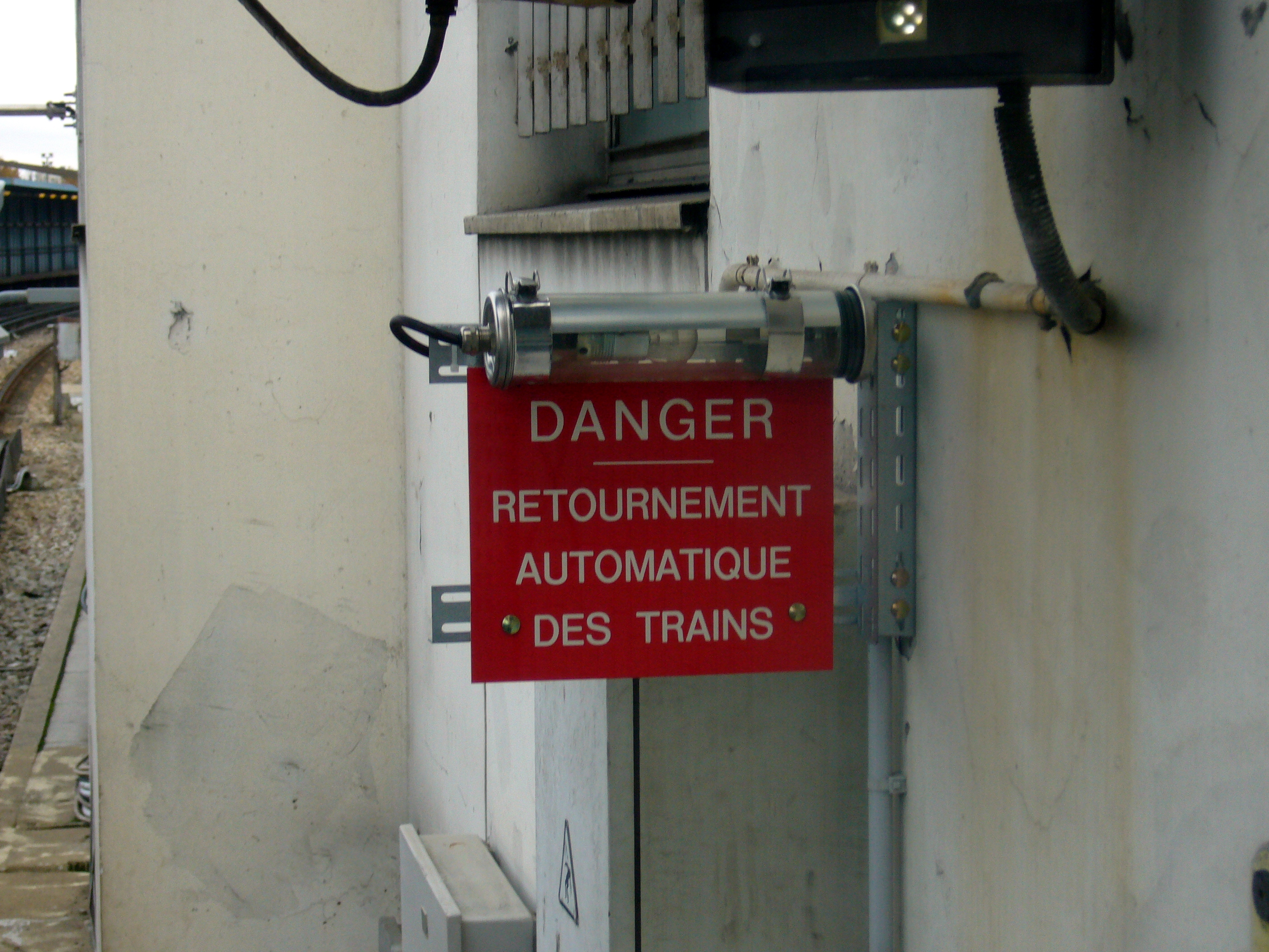 Avertissement sur le danger représenté par le retournement automatique des trains au terminus Châtillon - Montrouge sur la ligne 13 du métro de Paris.